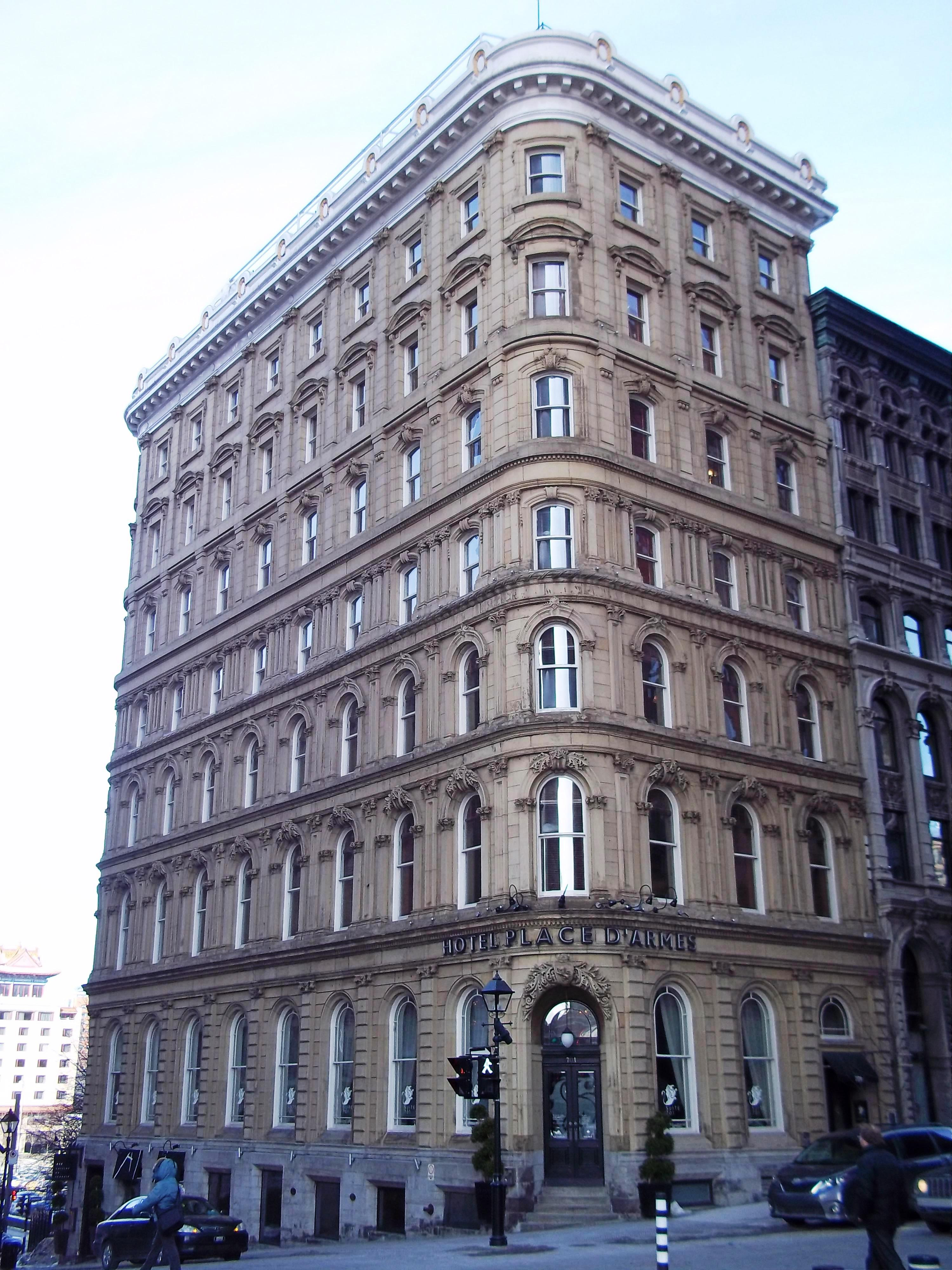 Édifice de la Great Scottish Life Insurance, côte de la Place d'Armes, Montréal